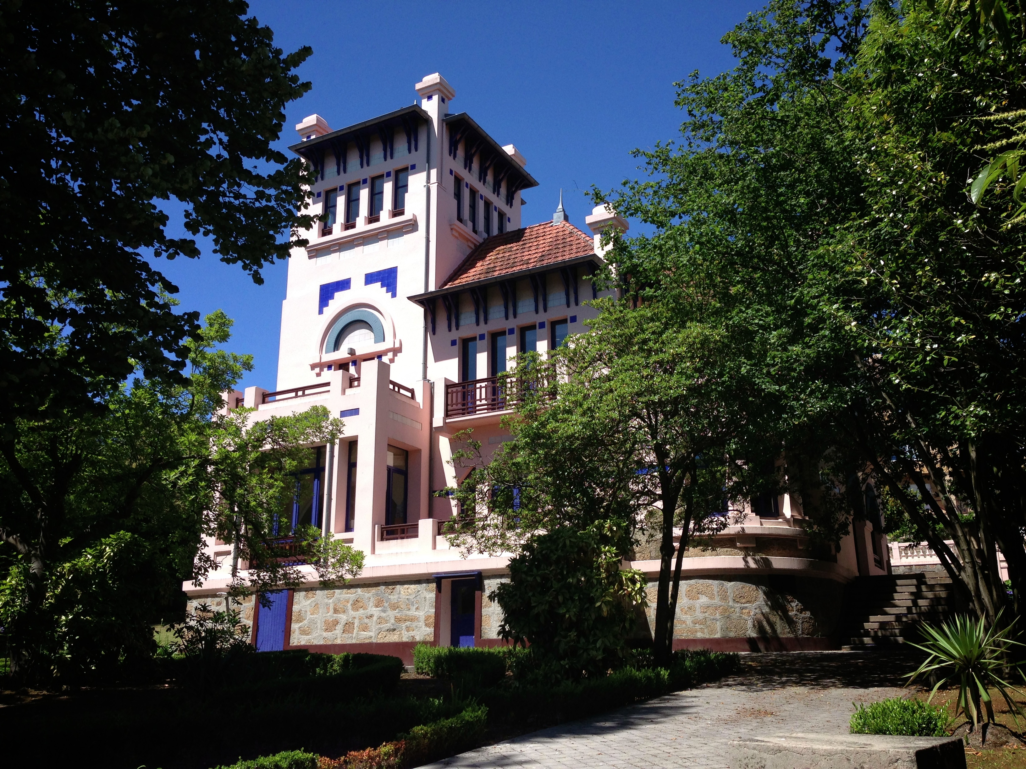 Biblioteca Municipal de Perillo, Oleiros (A Coruña).